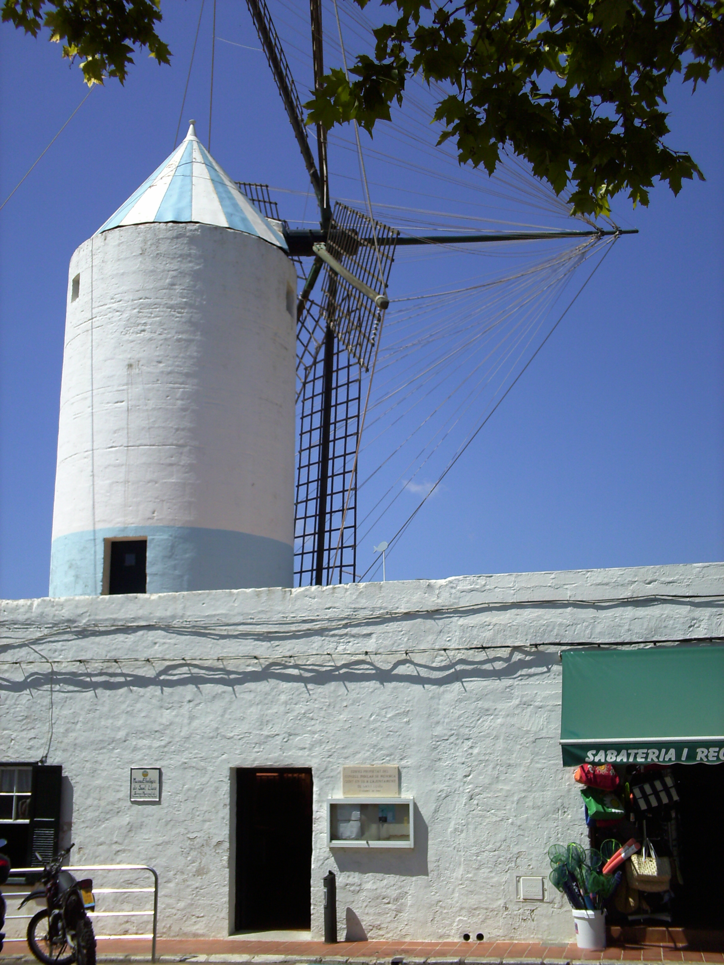 Vista des molí